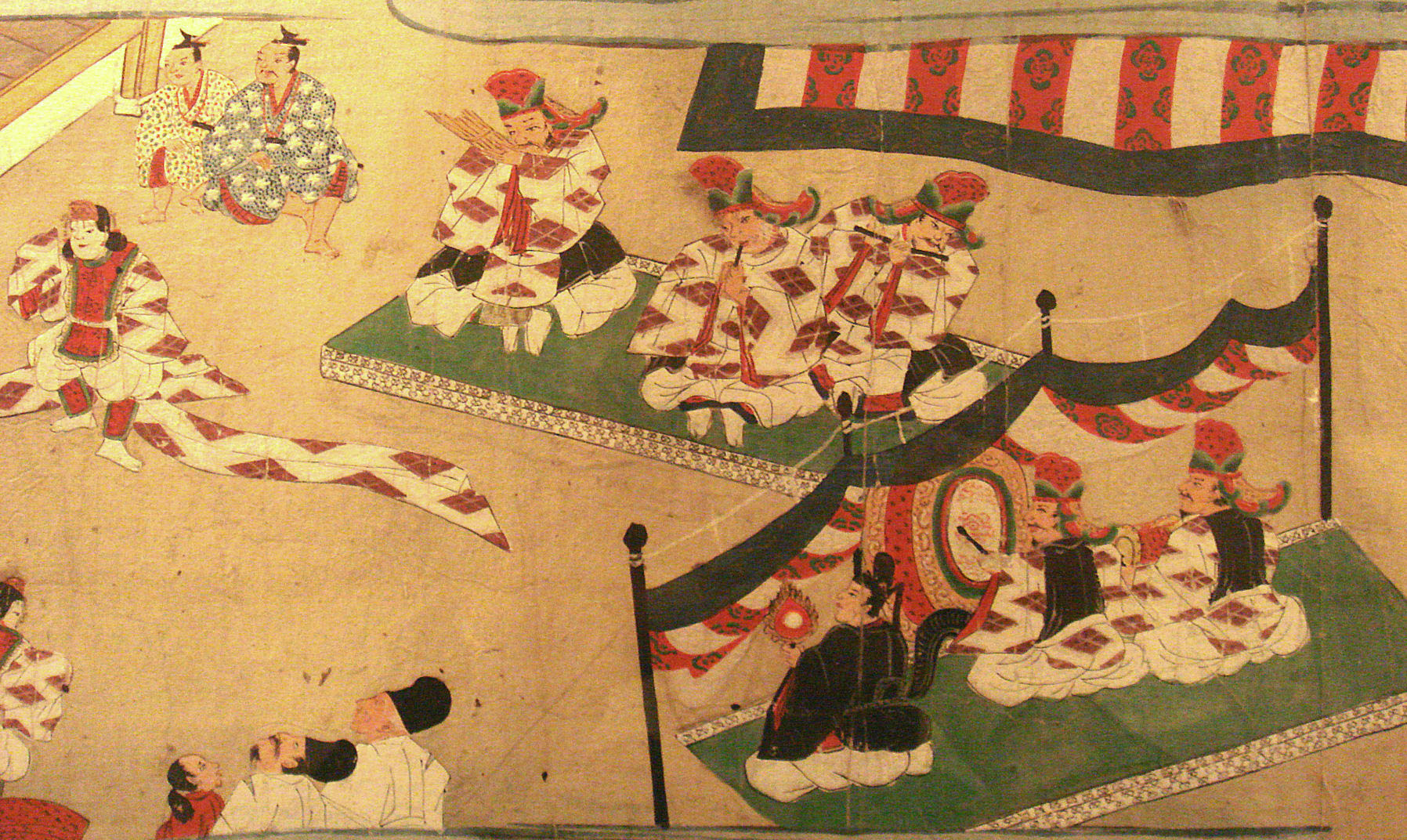 Muromachi-period music